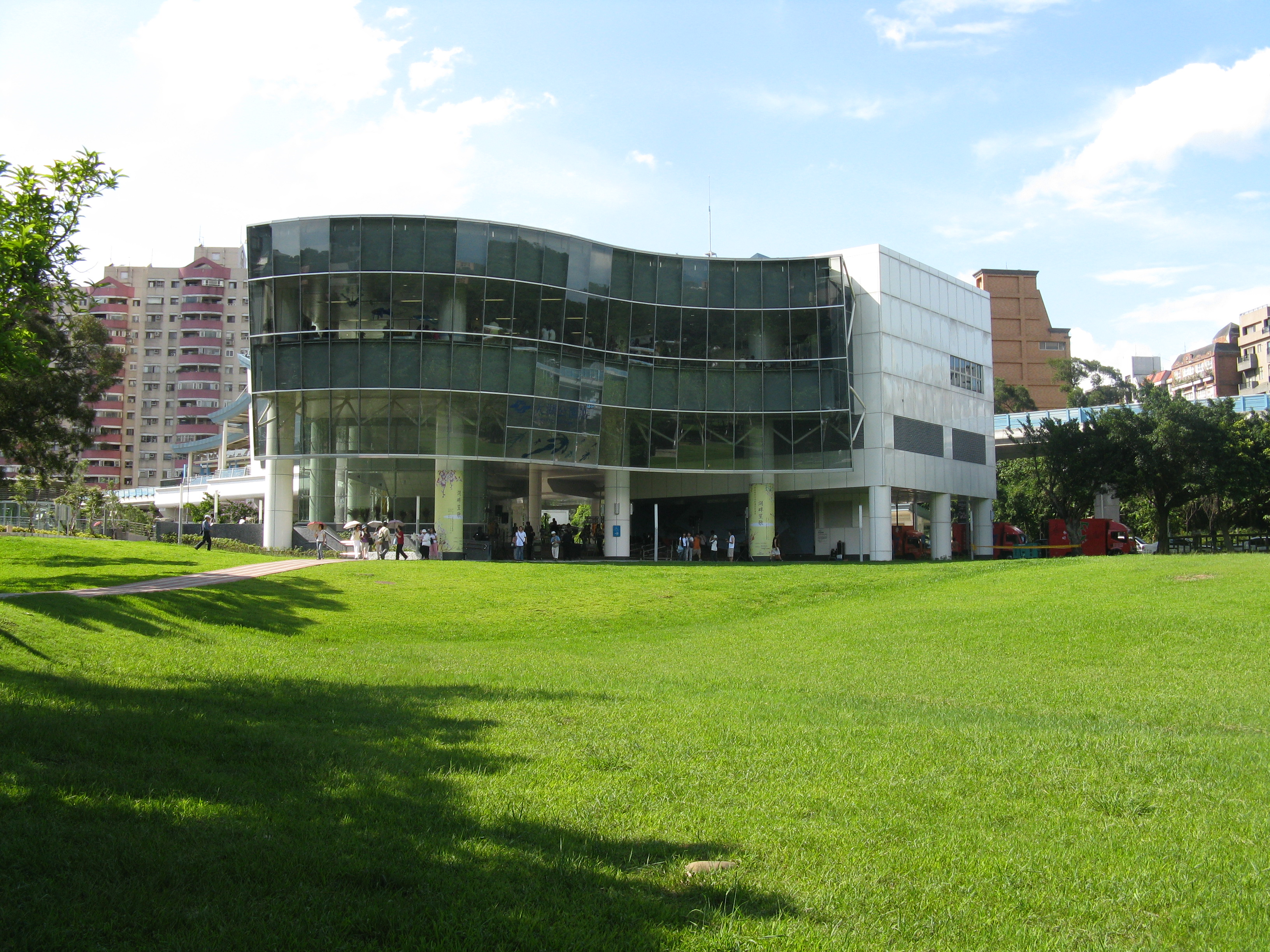 台北捷運内湖線大湖公園駅南口。